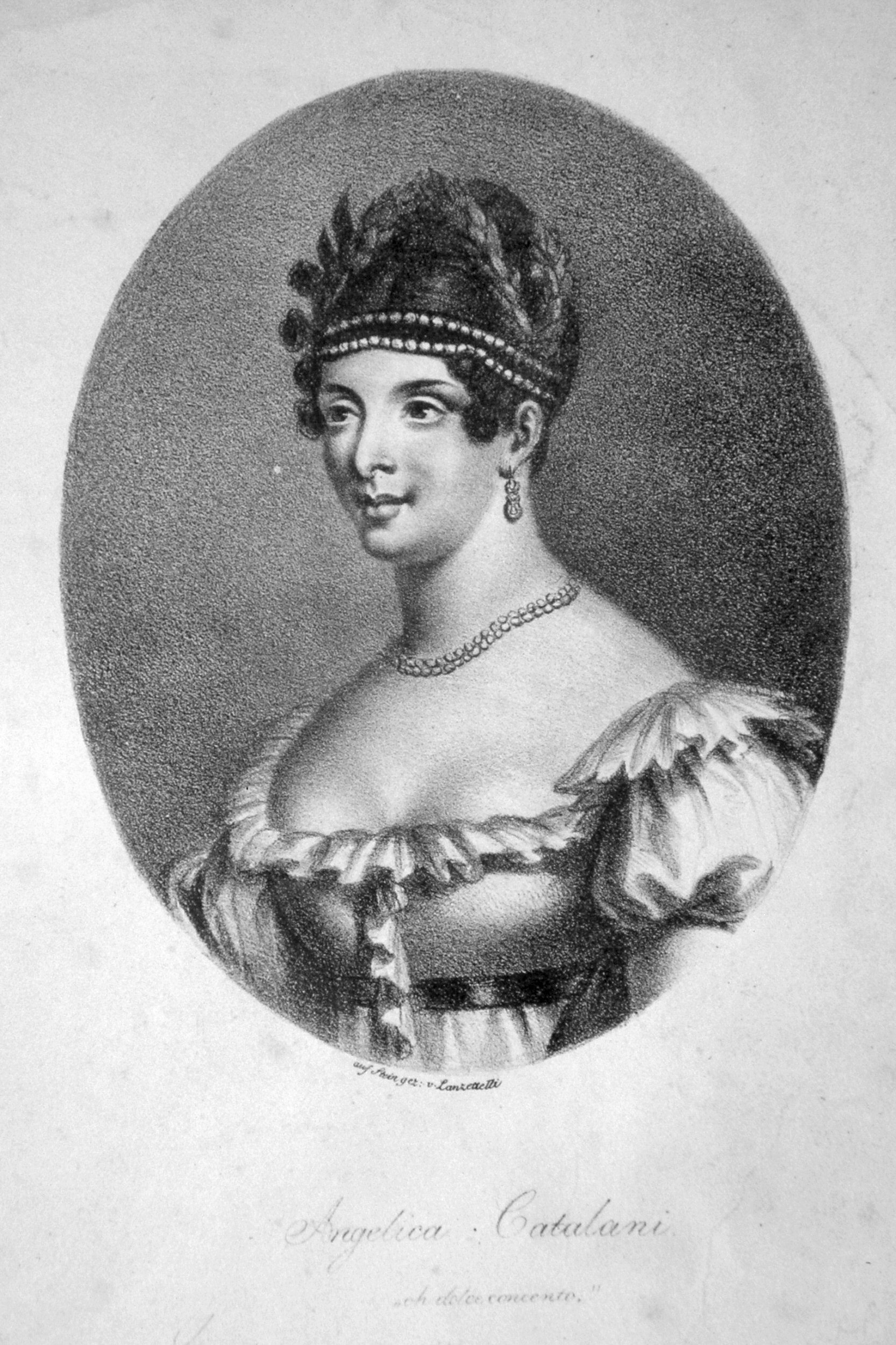 Angelica Catalani (1780-1849), italienische Opernsängerin (Sopran). Lithographie von Josef Lanzedelli d. Ä., ca. 1820